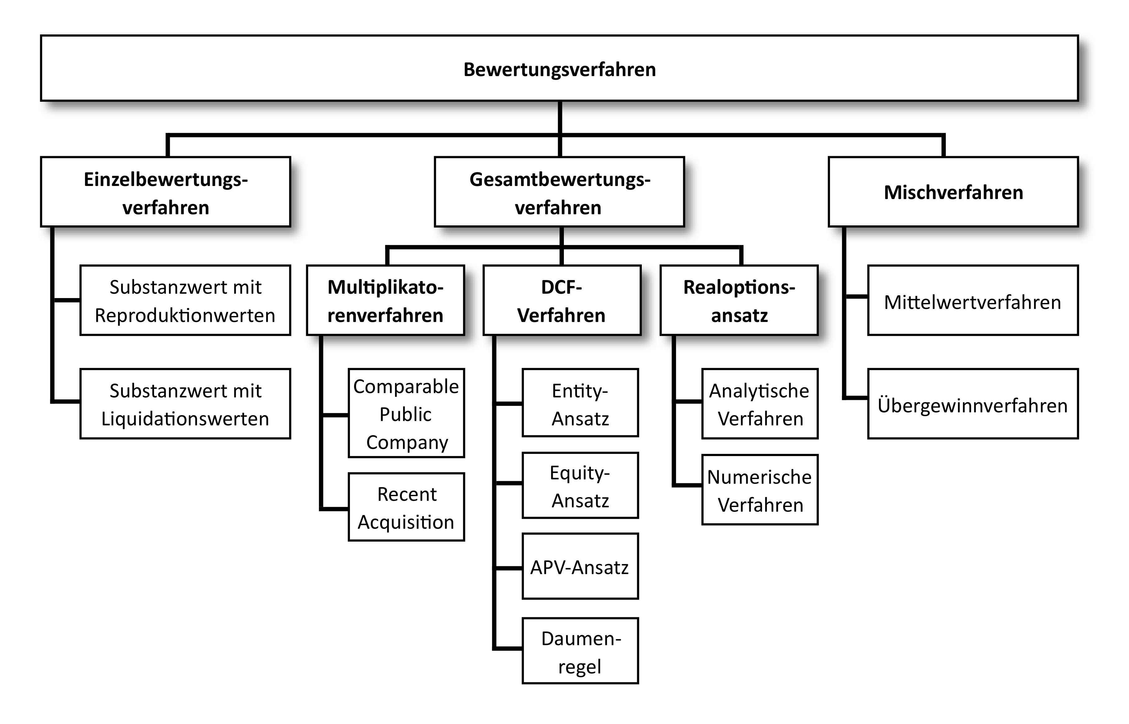 In Anlehnung an (Ernst, et al., 2008)